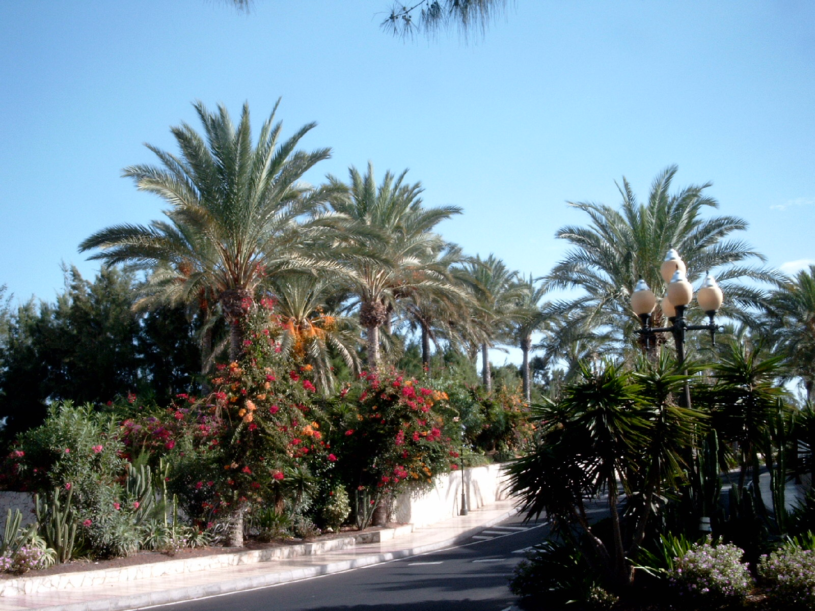 Palmen in Costa Calma